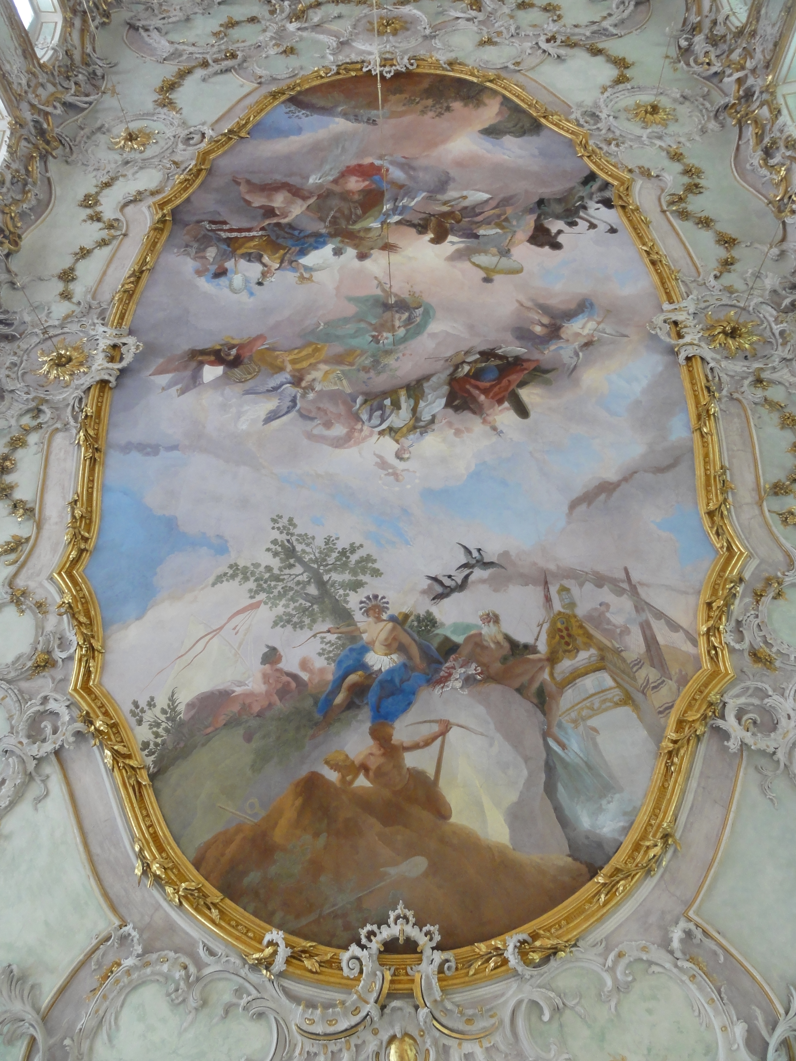 Augsburg, Schaezlerpalais — Festsaal Der Handel verbindet die Erdteile